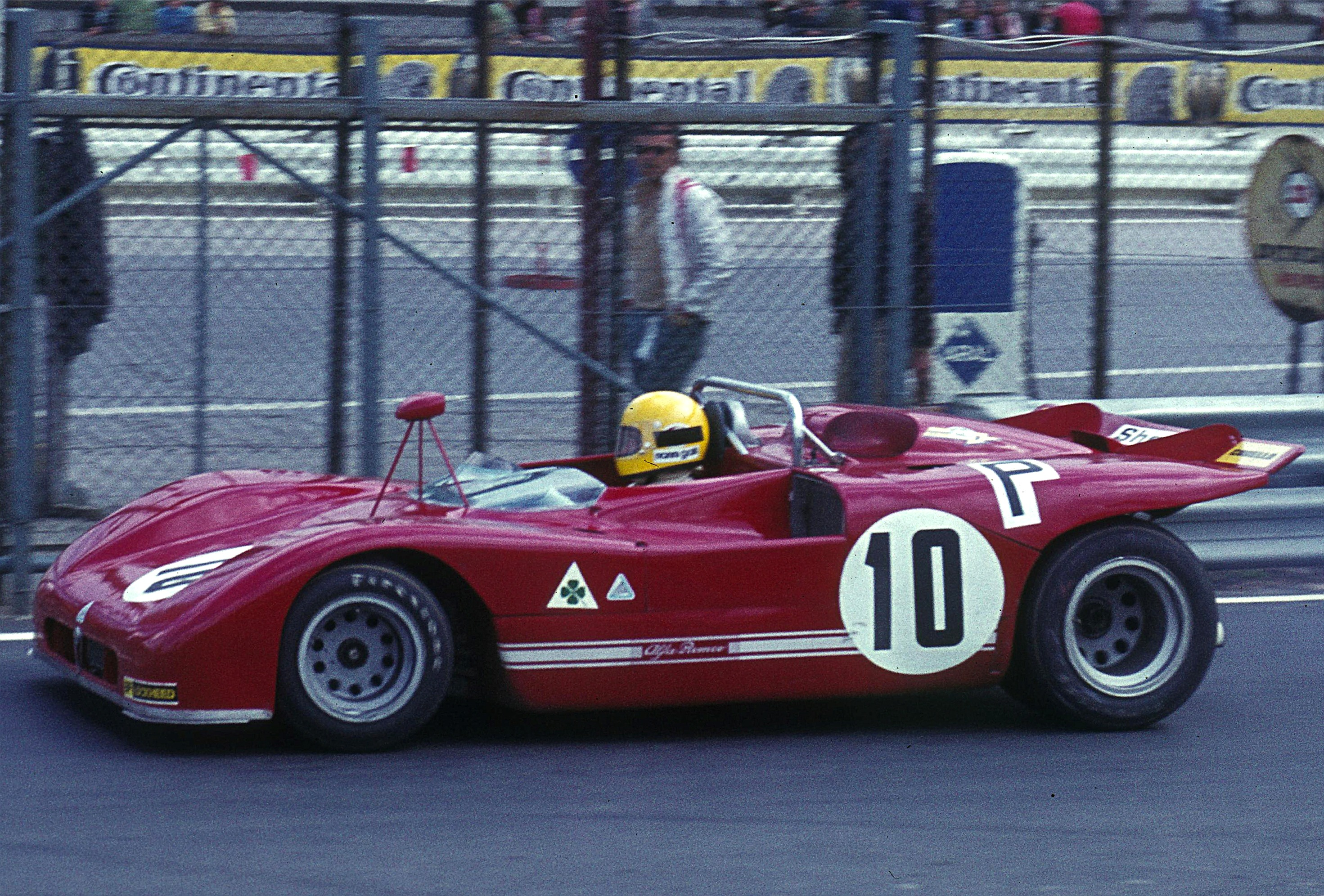 Nanni Galli im Alfa Romeo 33.3 beim Training zum 1000-km-Rennen auf dem Nürburgring 1971; Einfahrt zu den Boxen und zum Fahrerlager von der Gegengeraden aus